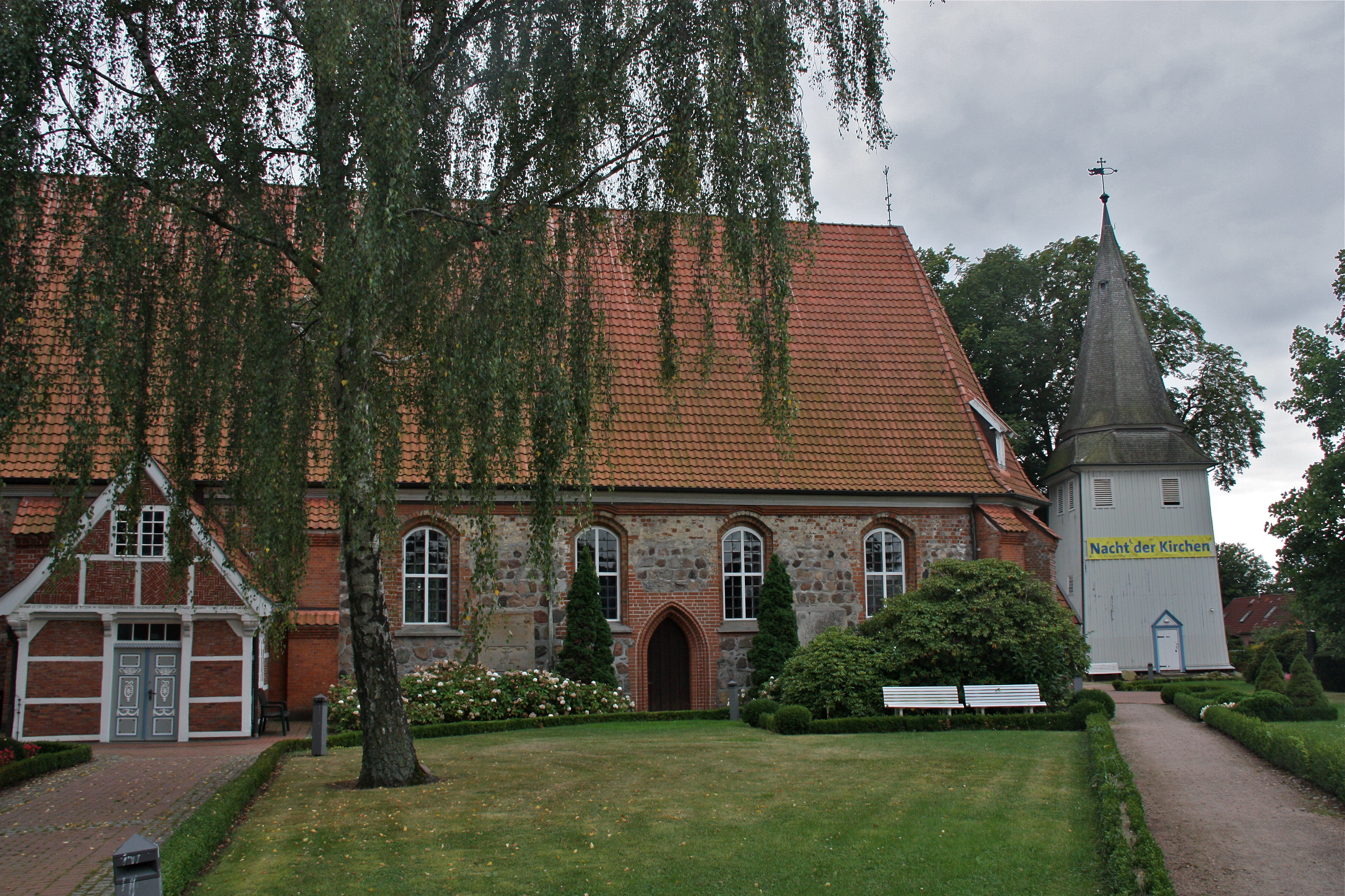 Sankt Johannis, Hamburg-Neuengamme, Ansicht von NordenThis is a photograph of an architectural monument.